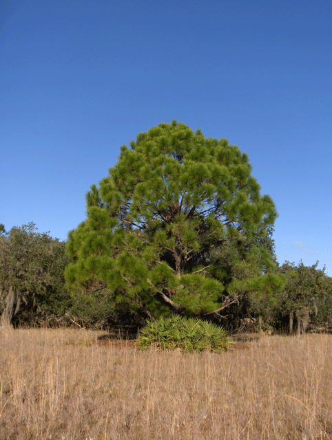 Found in Lake Kissimmee State Park, Florida